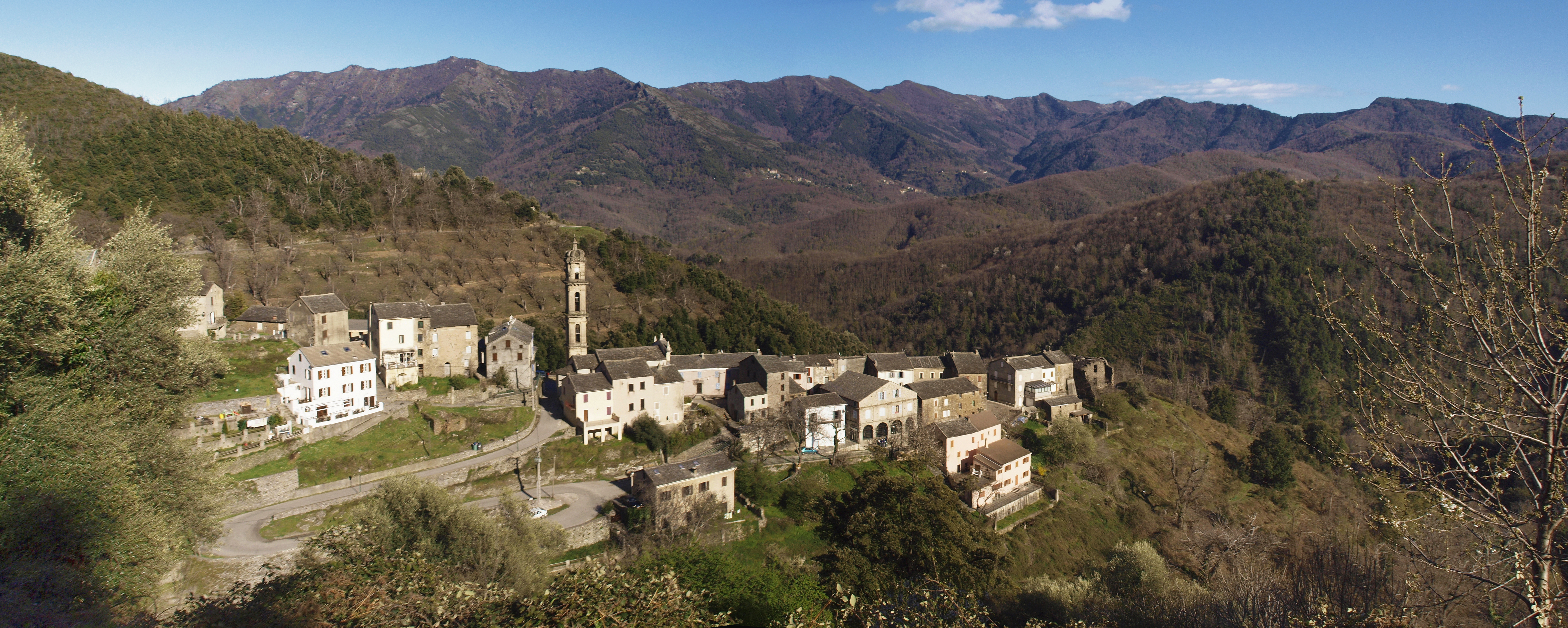 Verdèse (Corsica) - Vue du village